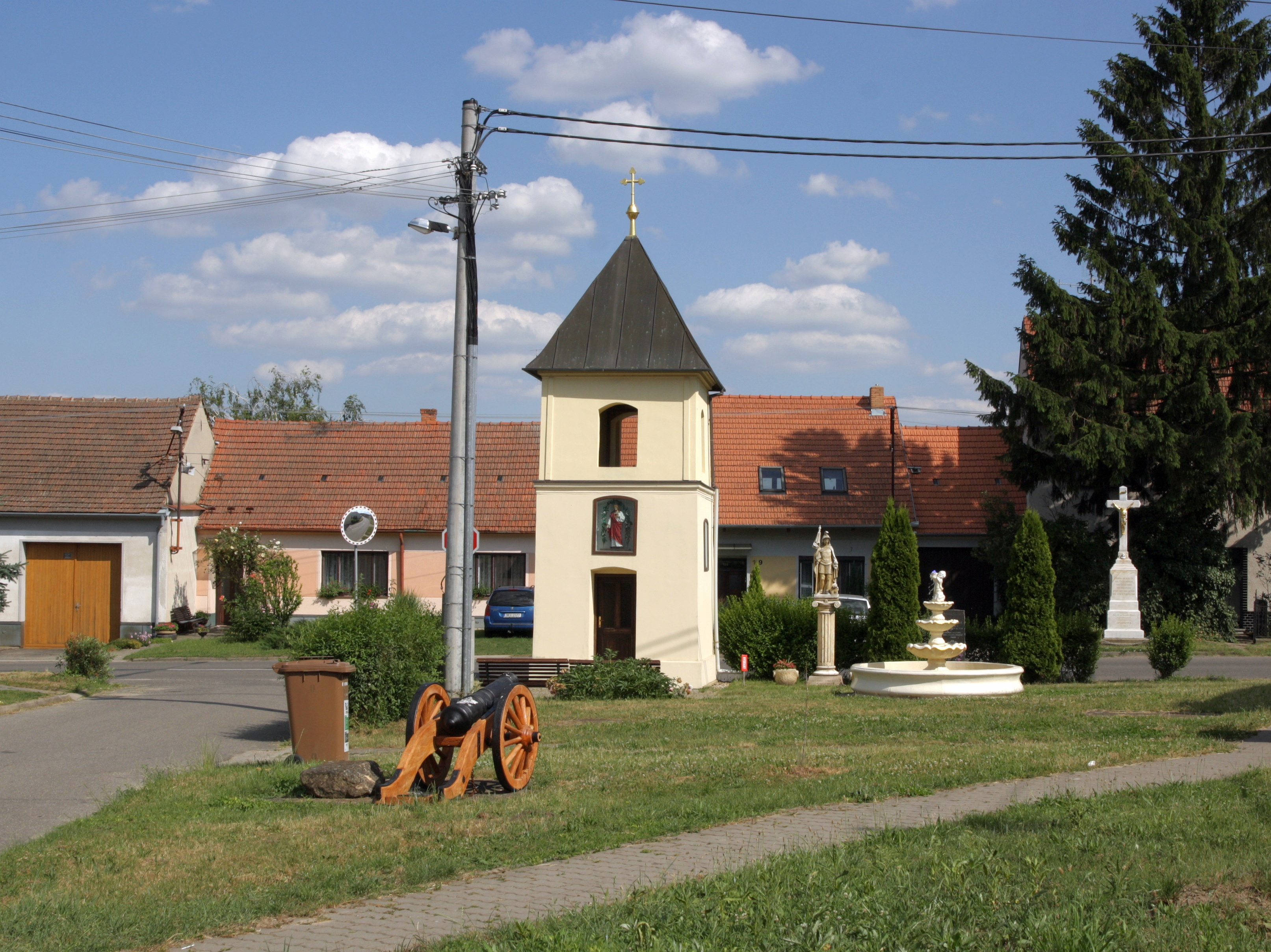 Hostěrádky-Rešov - náves se zvonicí a kanónem.